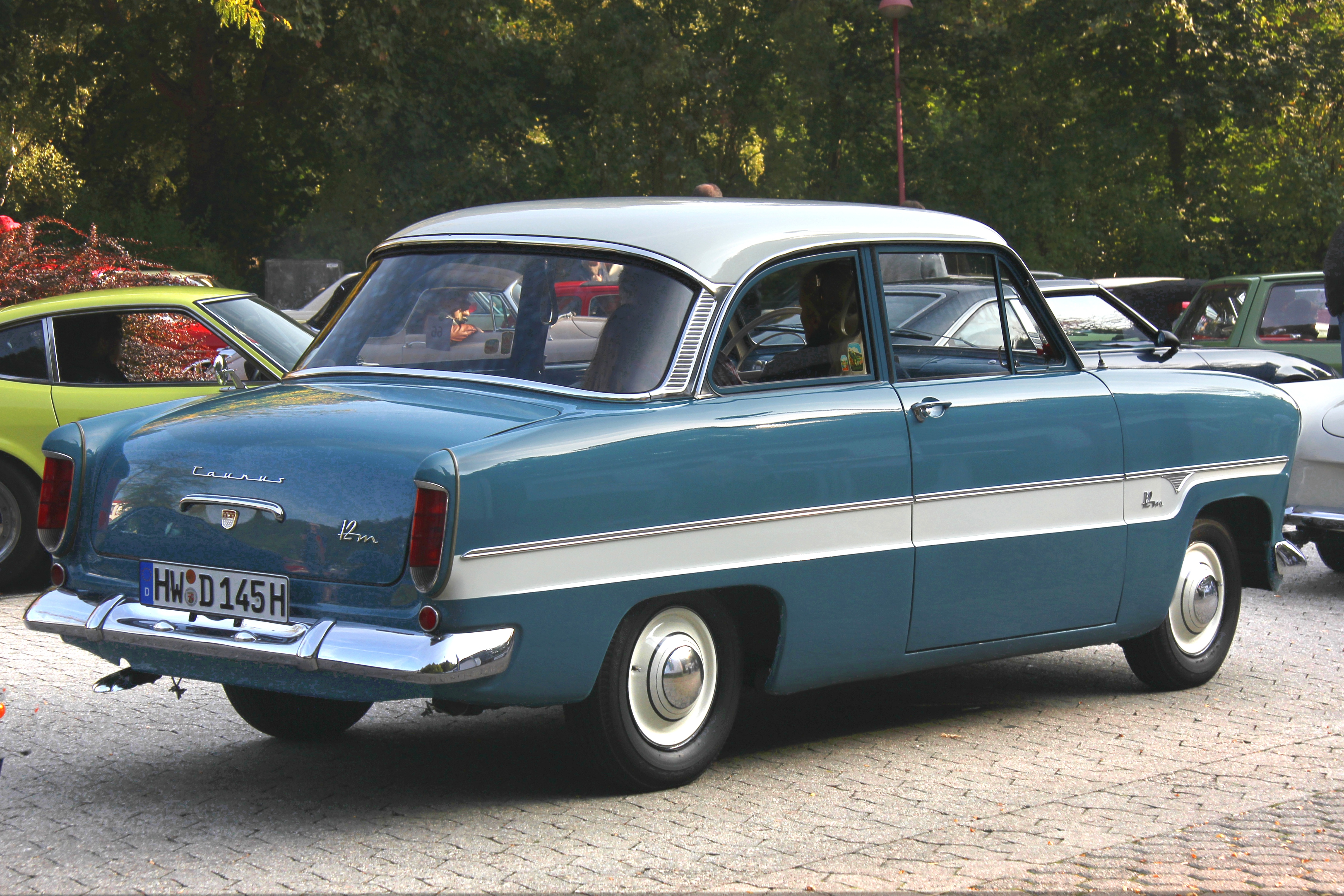 Ford Taunus 12m (P1), Bauzeit 1959 bis 1962, bei der Moselschiefer-Classik in Mayen; Kennzeichen verändert